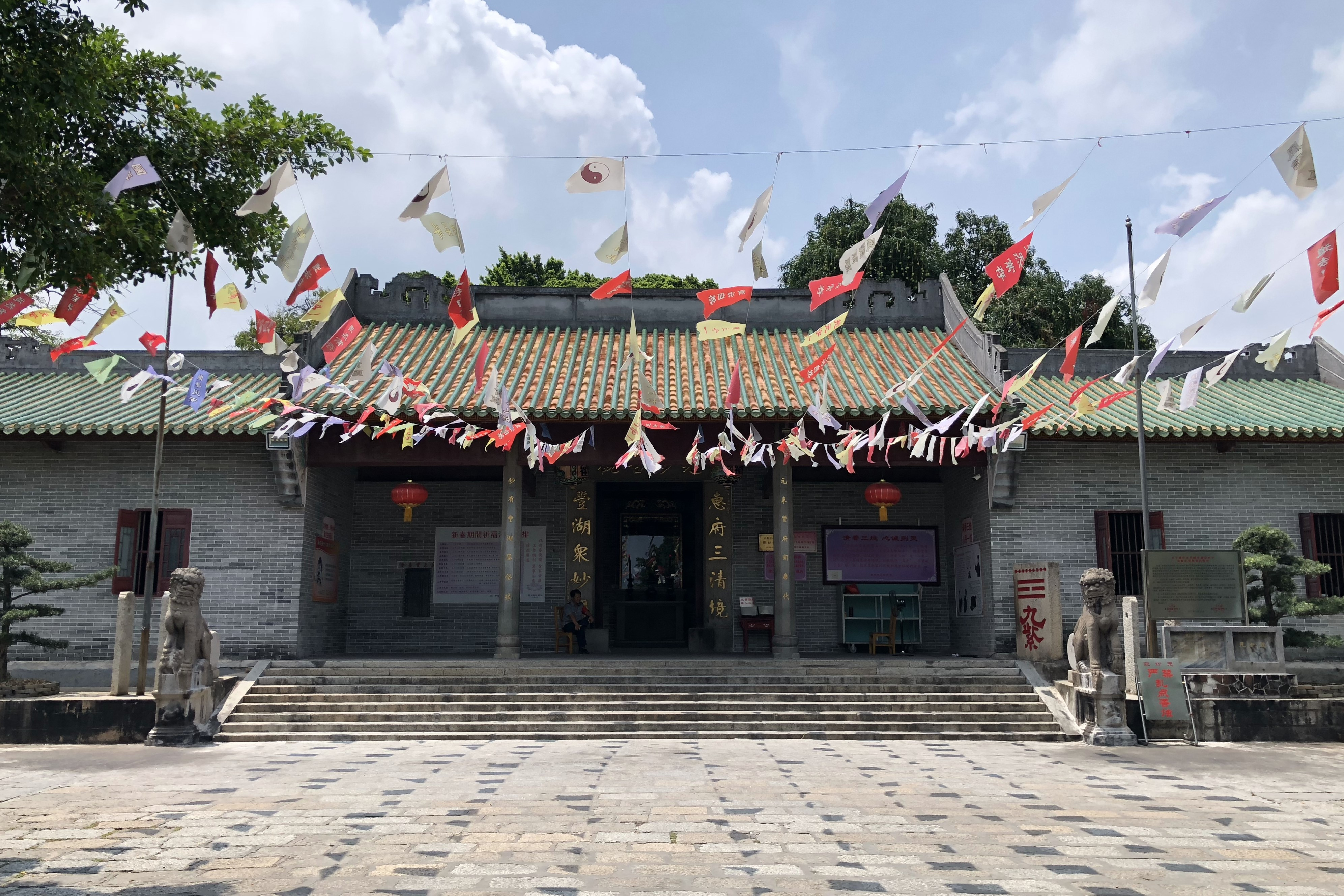 元妙观 山门